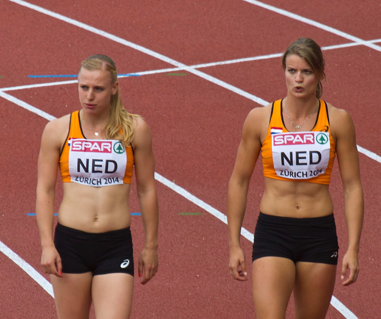 990785 aflossingnederland4x100finale